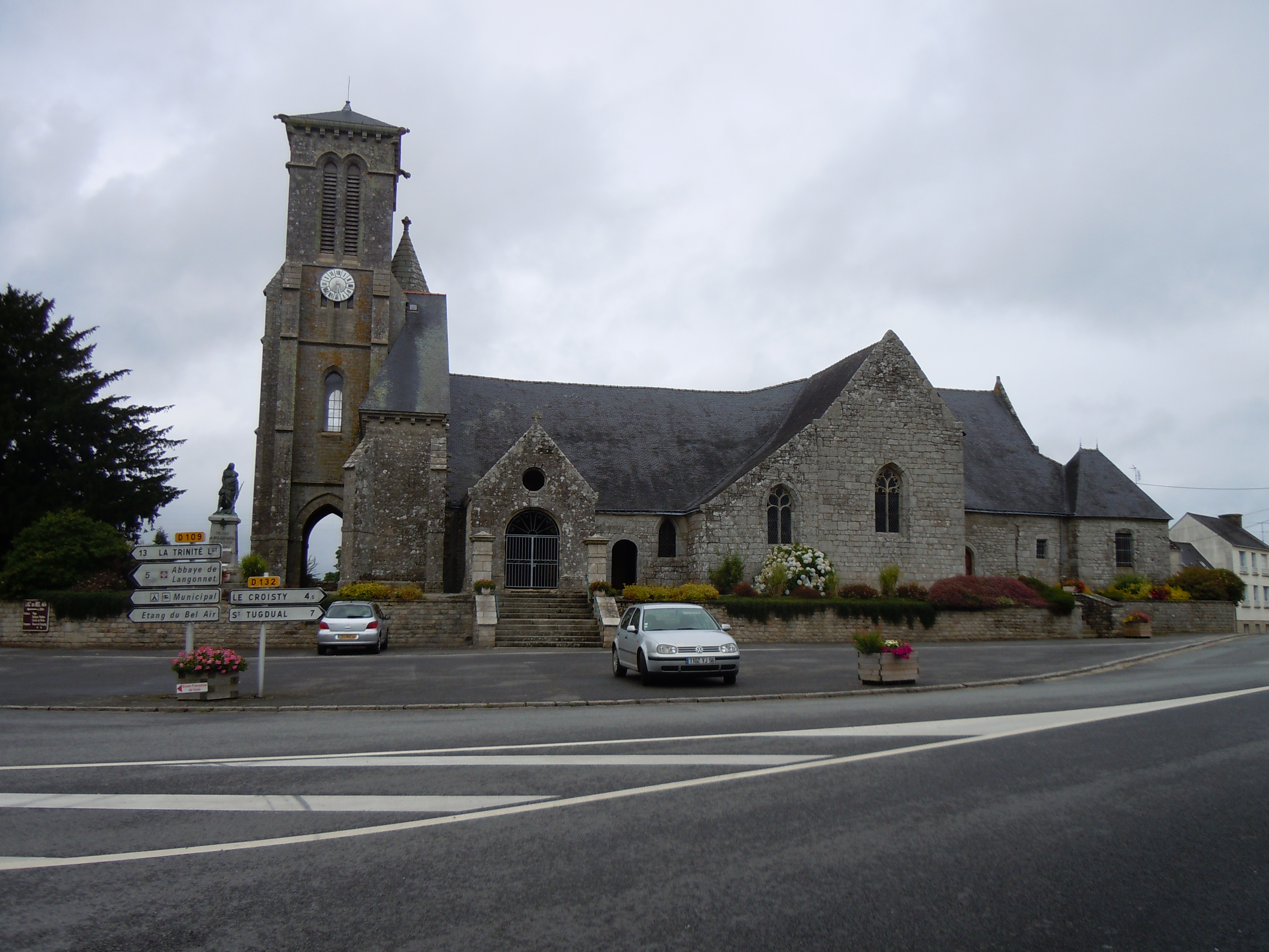 église paroissiale de Saint-Beheau, commune de Priziac, département du Morbihan, France